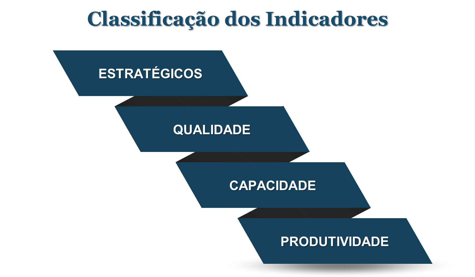 Classificação e ligação entre os tipos de indicadores de desemepenho